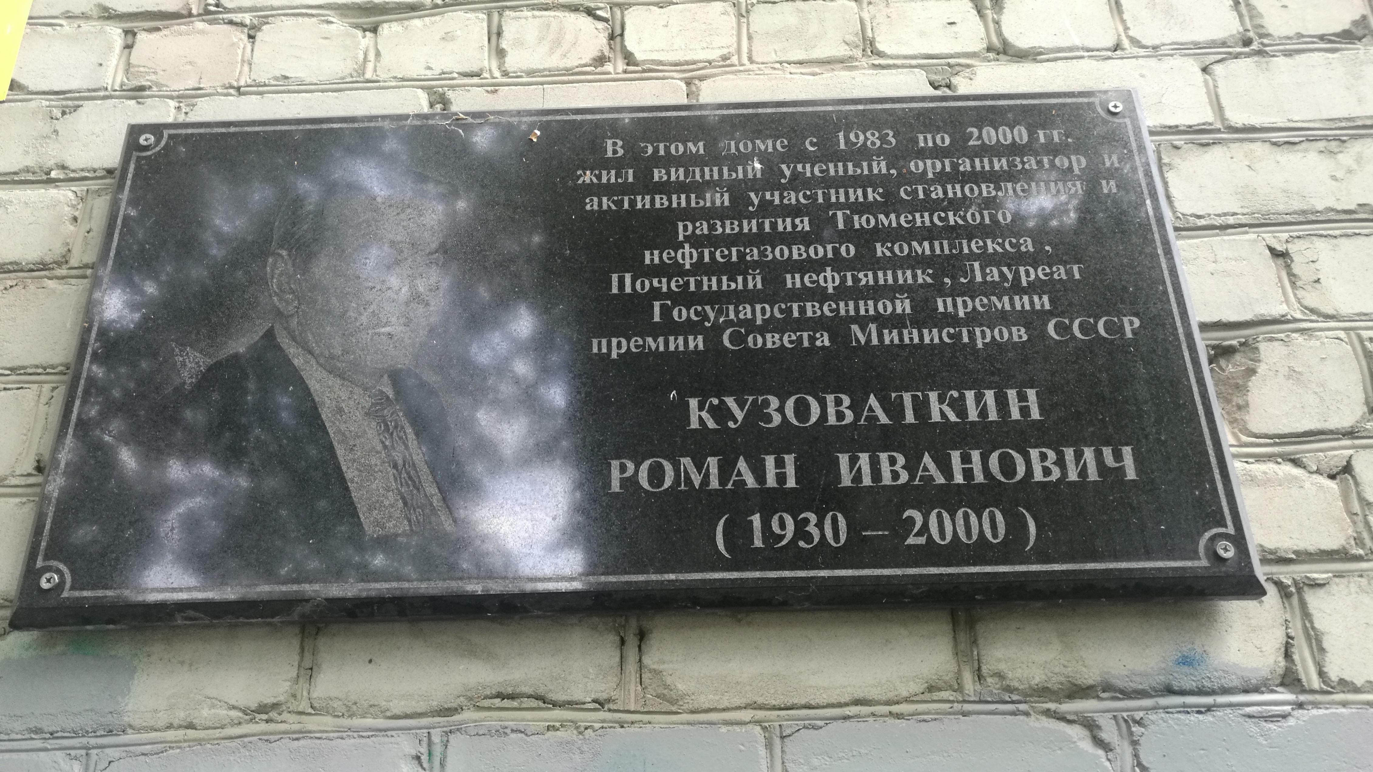 Memortabulo pri Roman Kuzovatkin. Tjumeno, Rusio.